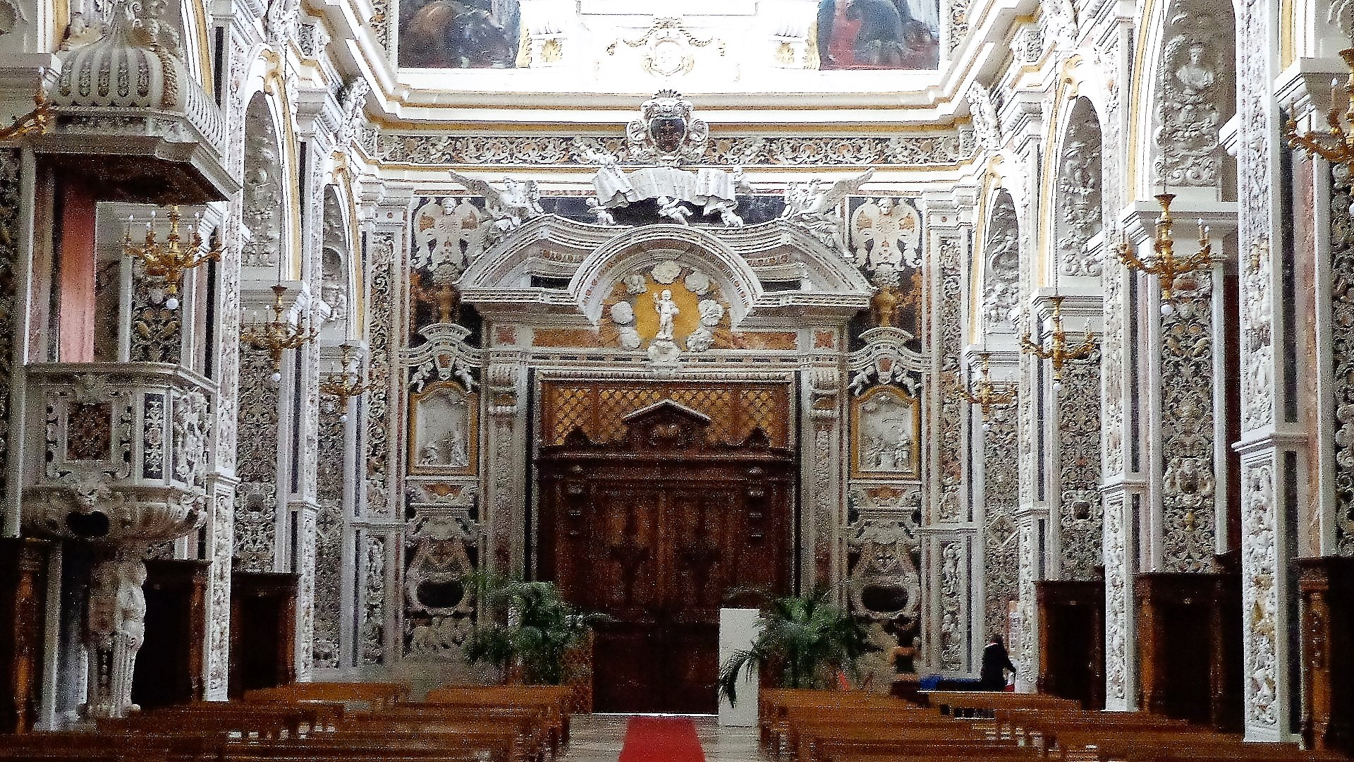 Interno chiesa